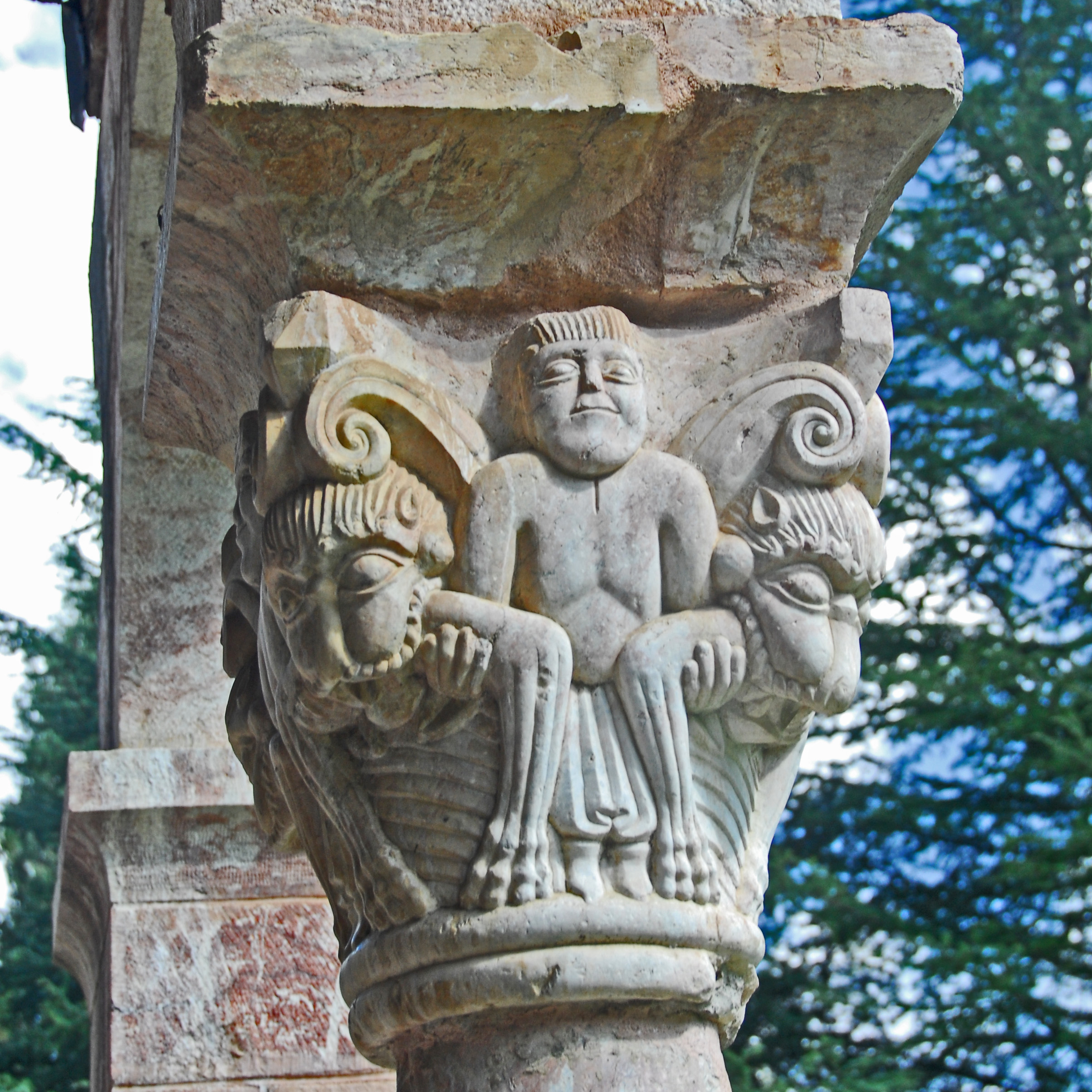 Abbaye Michel-de-Cuxa, Kapitell, Löwen, Tiere fressend, Mensch hält deren Arme